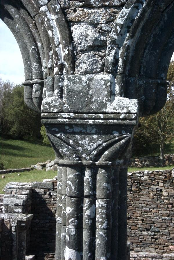 Chapelle de Languidou ; grandes arcades sud du choeur